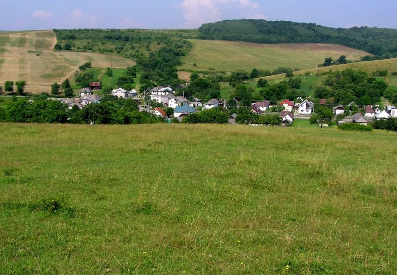 Celkový pohľad